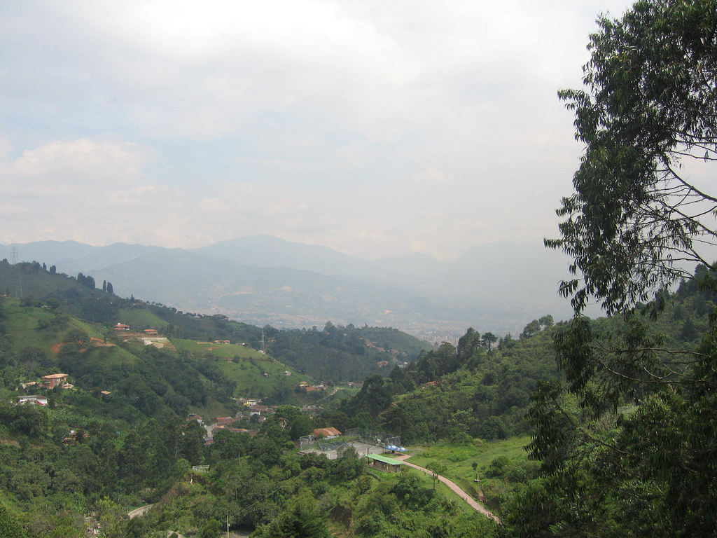 Ecoparque Los Salados de Envigado. Colombia.